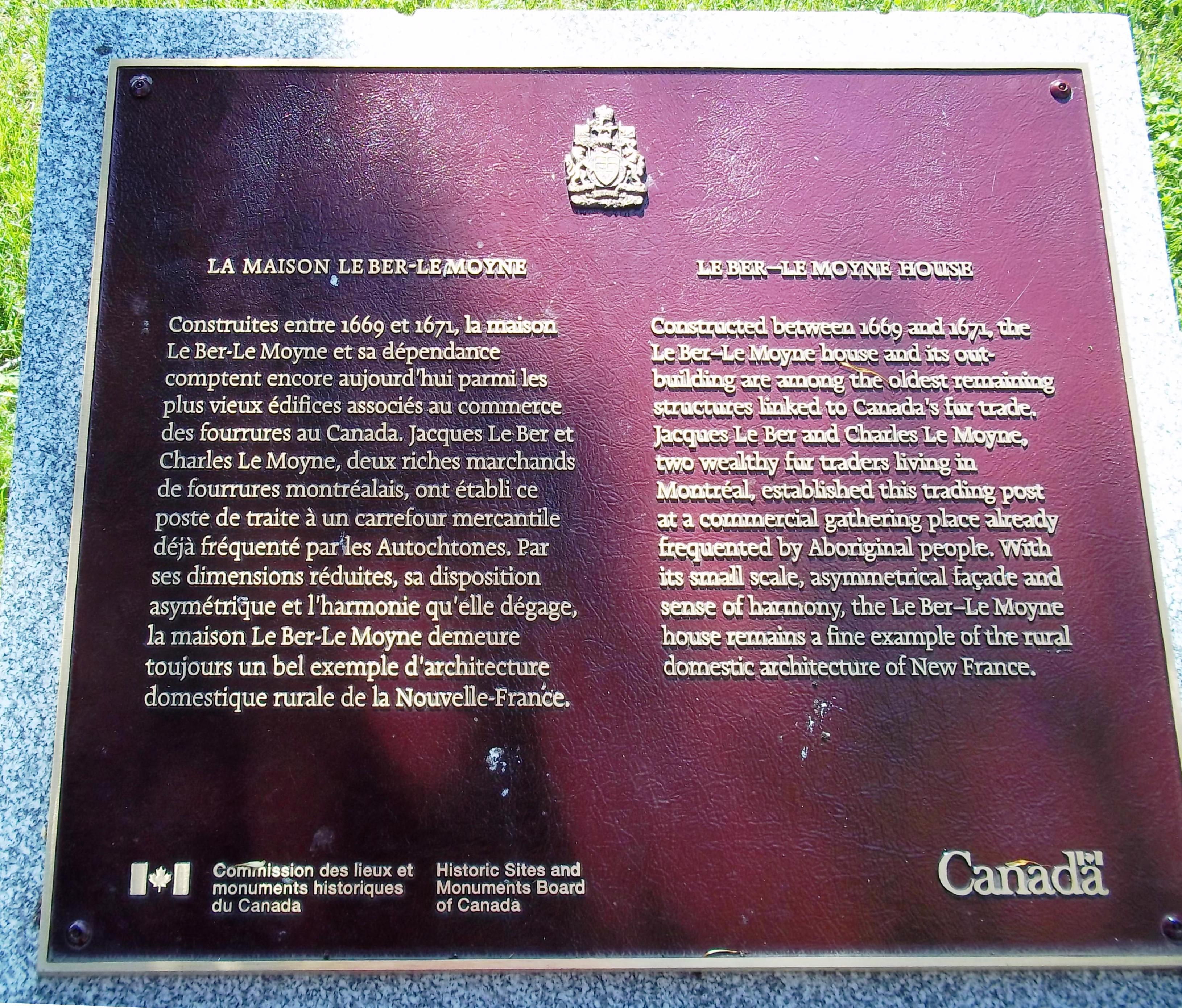 Plaque devant la maison LeBer-LeMoyne à Lachine